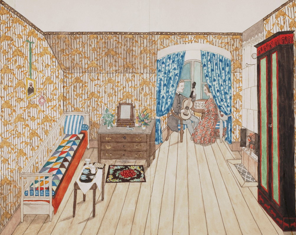 Åttonde bostaden: Mitt rum uti huset N:ro 25 vid Cathrina Högbergsgata, Qvarteret Pelarbacken större, 3 tr upp. Personer: Johan Edholm, Undertecknad